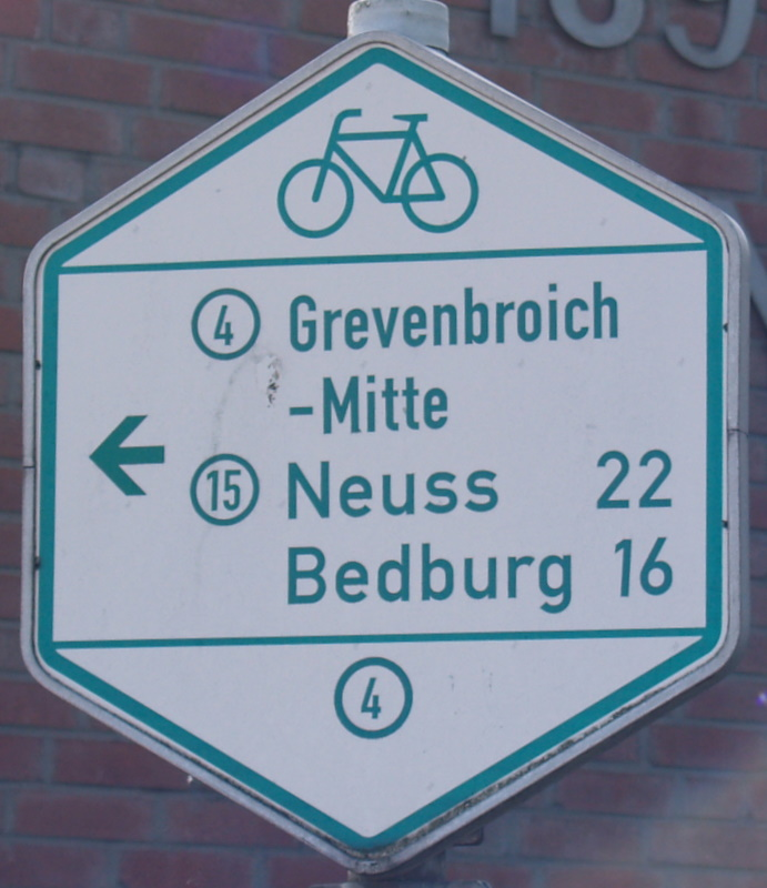 R-Wegenetz NRW